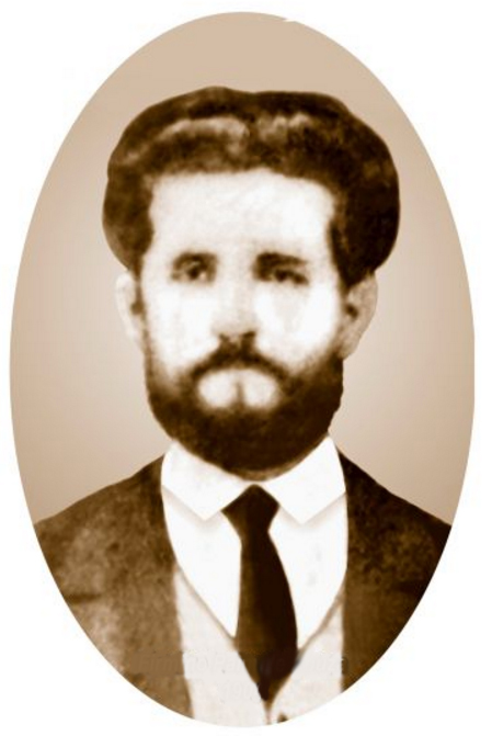 Firmino Paim de Souza